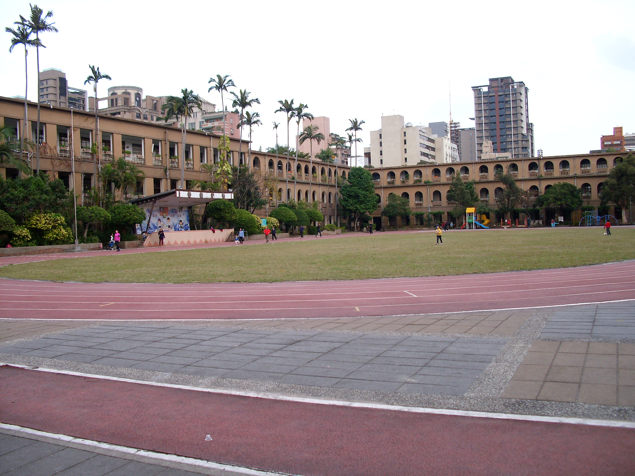 Bân-lâm-gú: 老松國小運動場佮教室